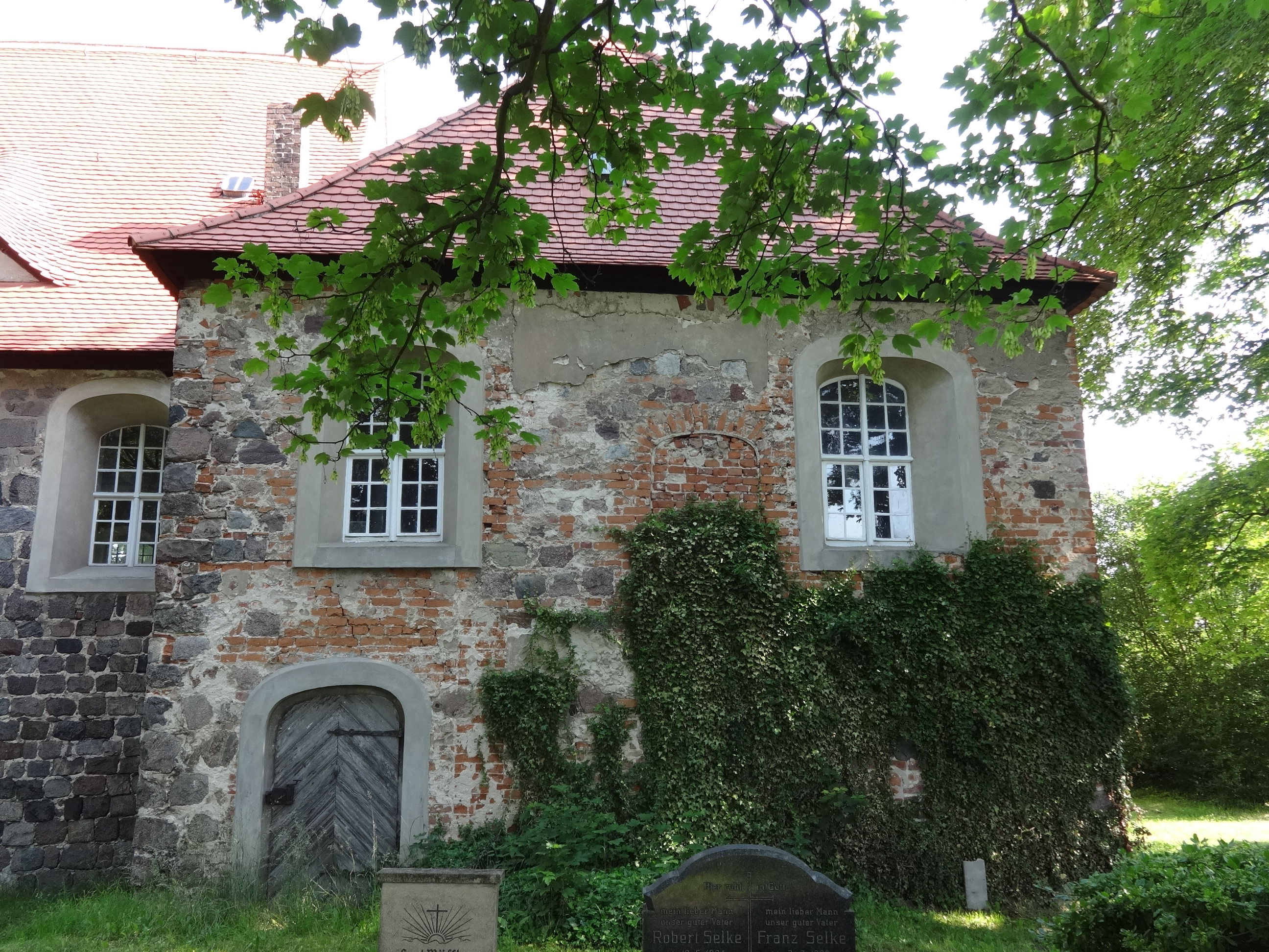 Die evangelische Dorfkirche in Groß Machnow ist eine Feldsteinkirche mit eingezogenem Chor und halbrunder Apsis aus dem 13. Jahrhundert. In seinem Innern befindet sich ein Altaraufsatz aus dem Jahr 1699 sowie eine Hufeisenempore aus dem Jahr 1690. Ein Epitaph erinnert an Otto von Schlabrendorf.